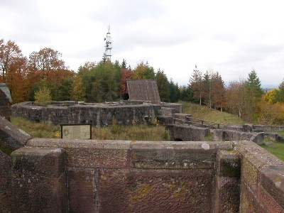 zlef gemaakte (en bewerkte} foto